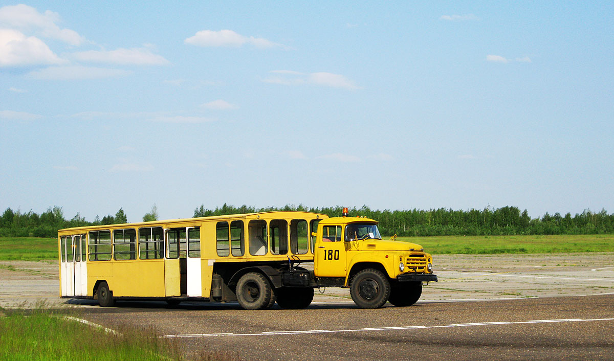 АППА-4 в аэропорту Стрежевого